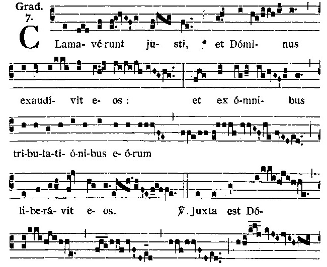 gregorianischer Choral